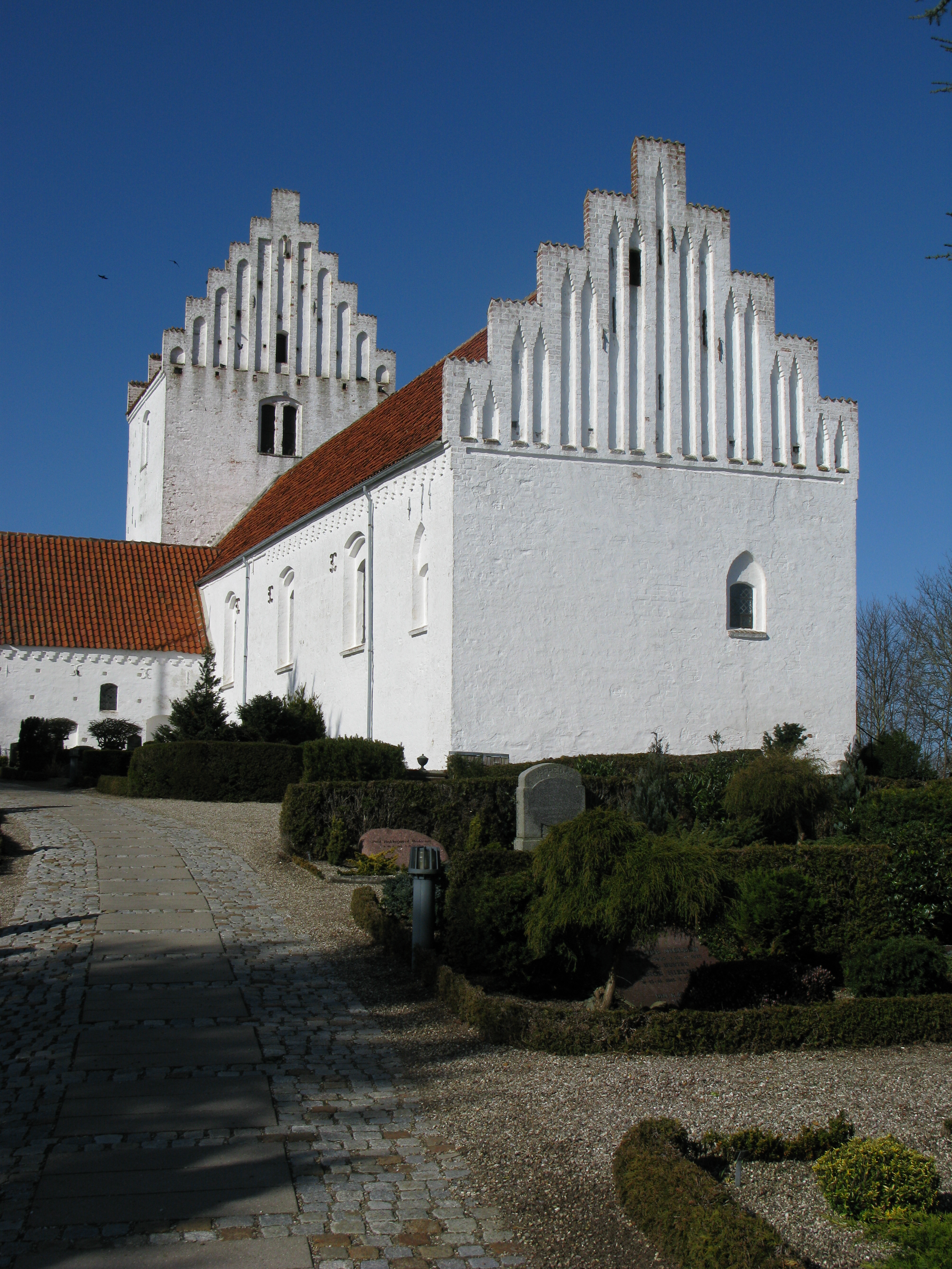 Kundby Kirke set fra øst.